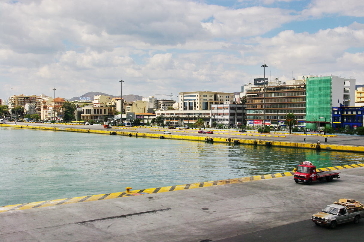 Kantharos - Hafen von Piräus